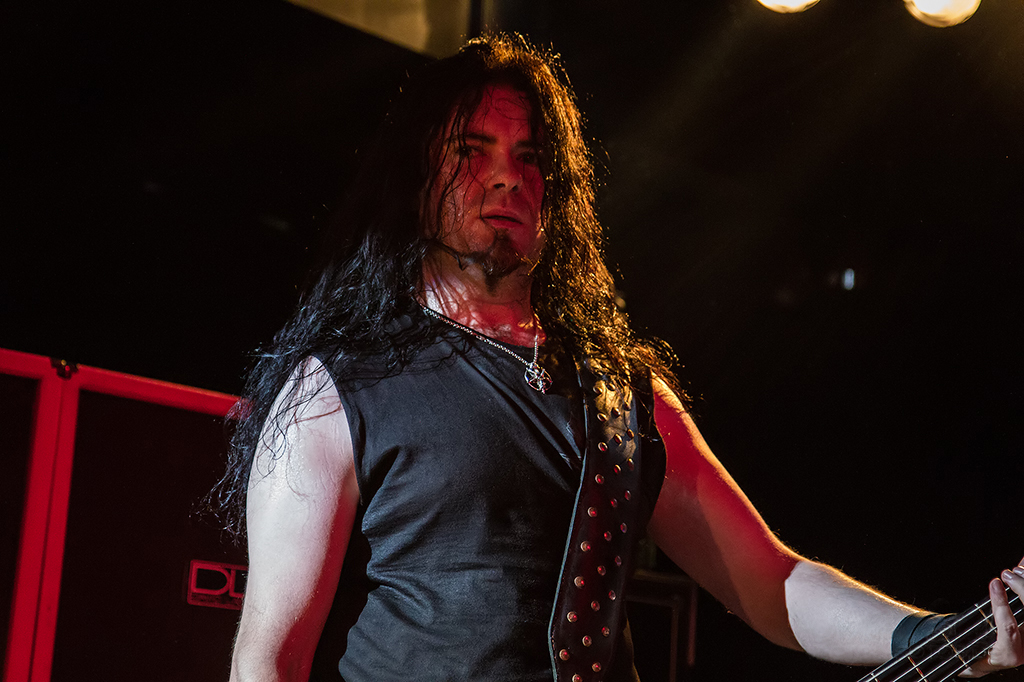 Vader Westpark Ingolstadt 31 01 2013